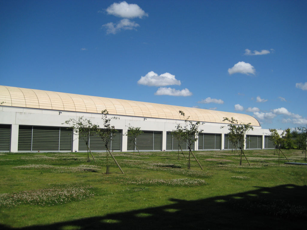 Pavillon des archives de l'IMEC relié par un tunnel à la bibliothèque aménagée dans l'ancienne église abbatiale de l'abbaye d'Ardenne (Calvados, France).